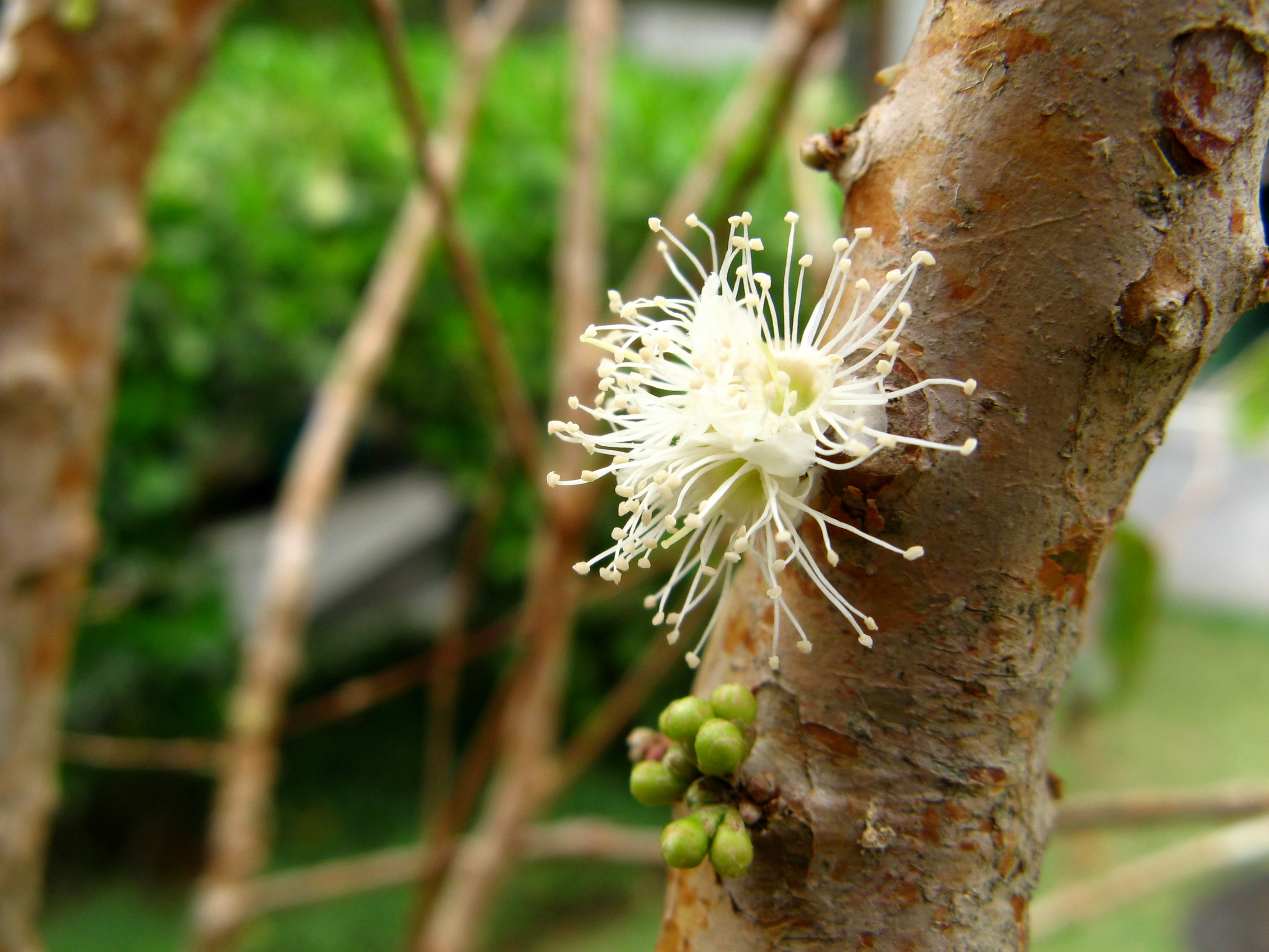 flor de jaboticaba (Plinia cauliflora) CASA de mamâ, Sao Paulo